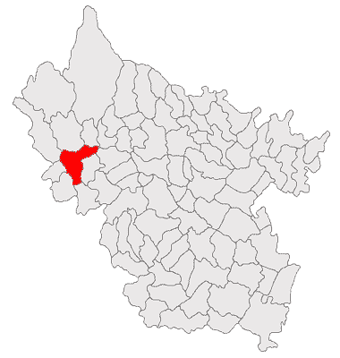 Categorie:Hărţi ale judeţului Buzău